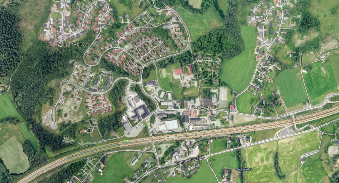 Lierskogen Sentrum.